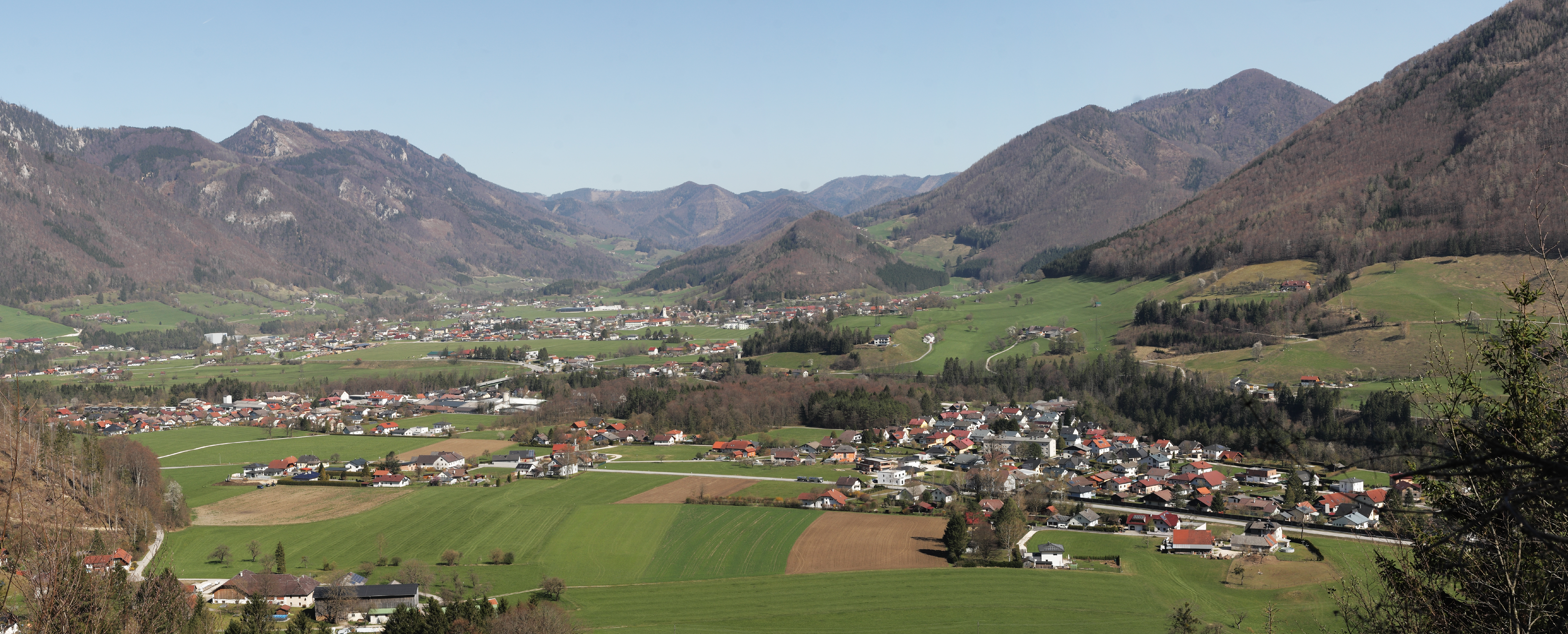 Das Steyrtal mit dem Mollner Becken. Blick von einer Forststraße am Steinkogel.